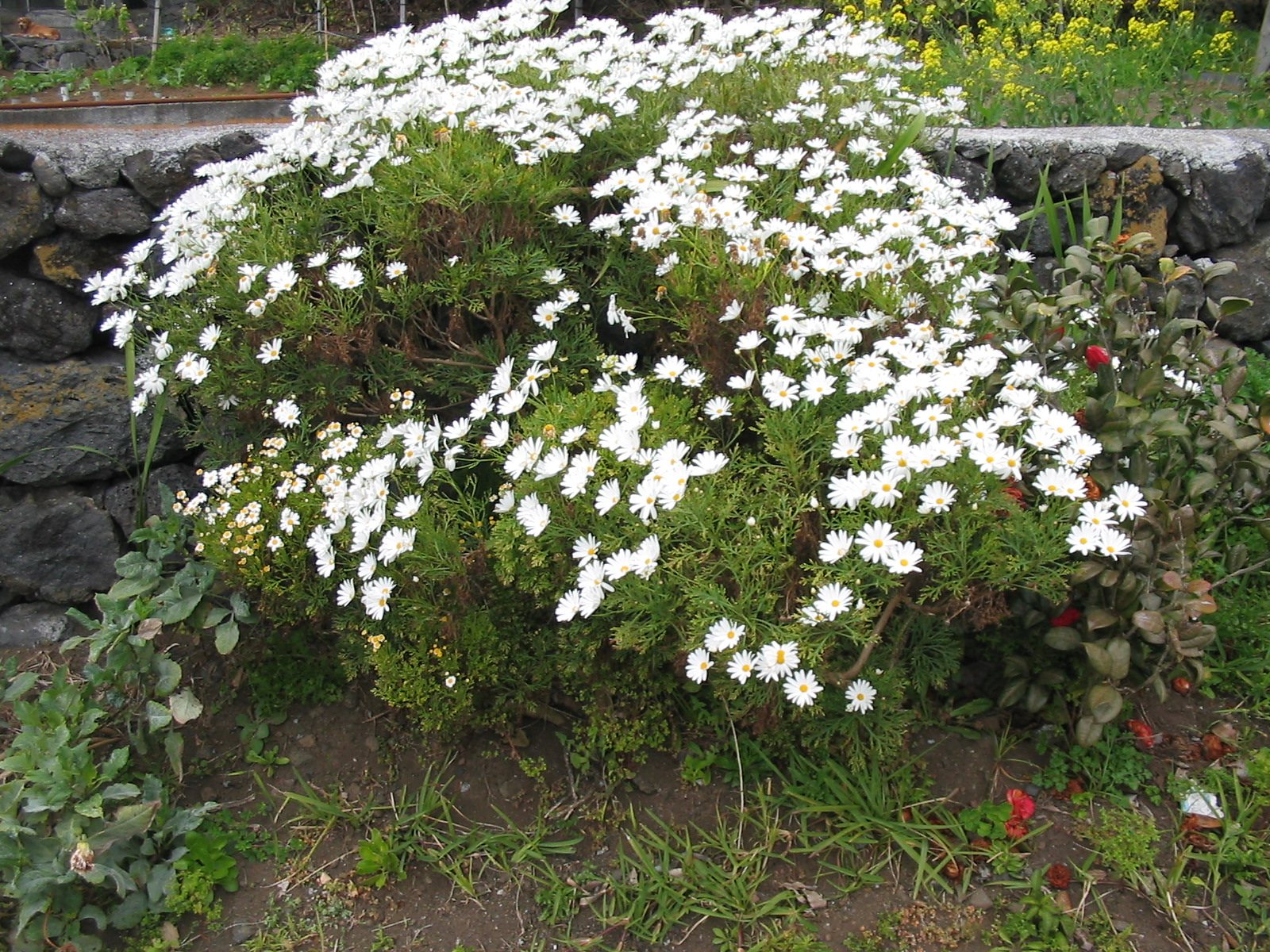 Strauchmargerite (Argyranthemum frutescens) - Habitus